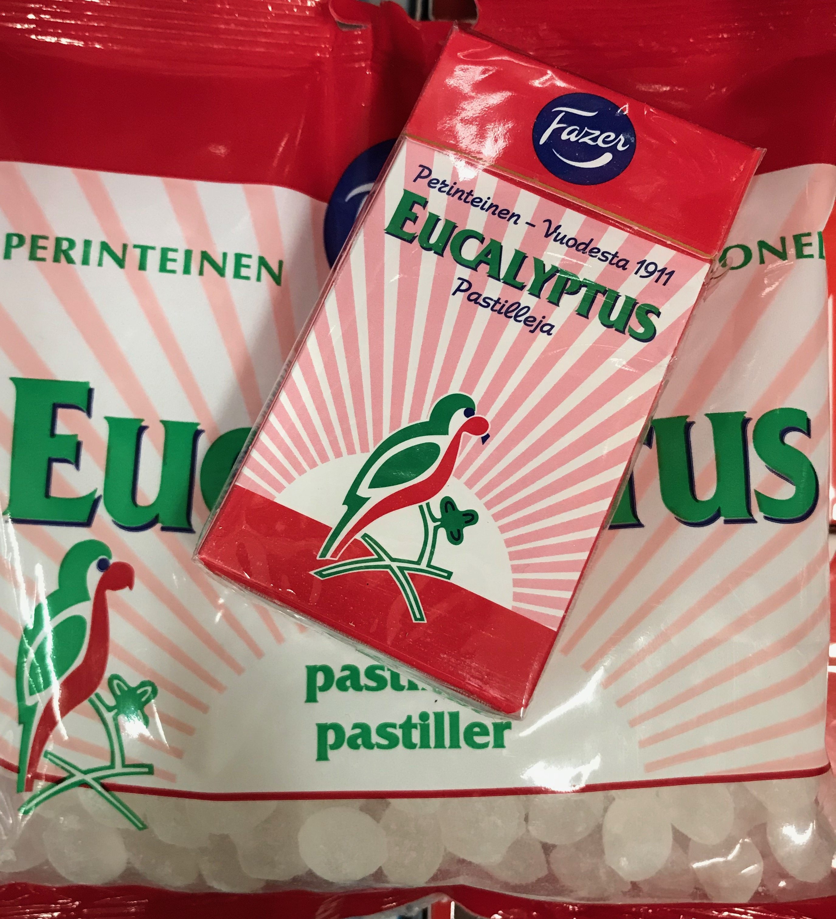 Fazerin Eucalyptus -makeisia rasiassa ja pussissa